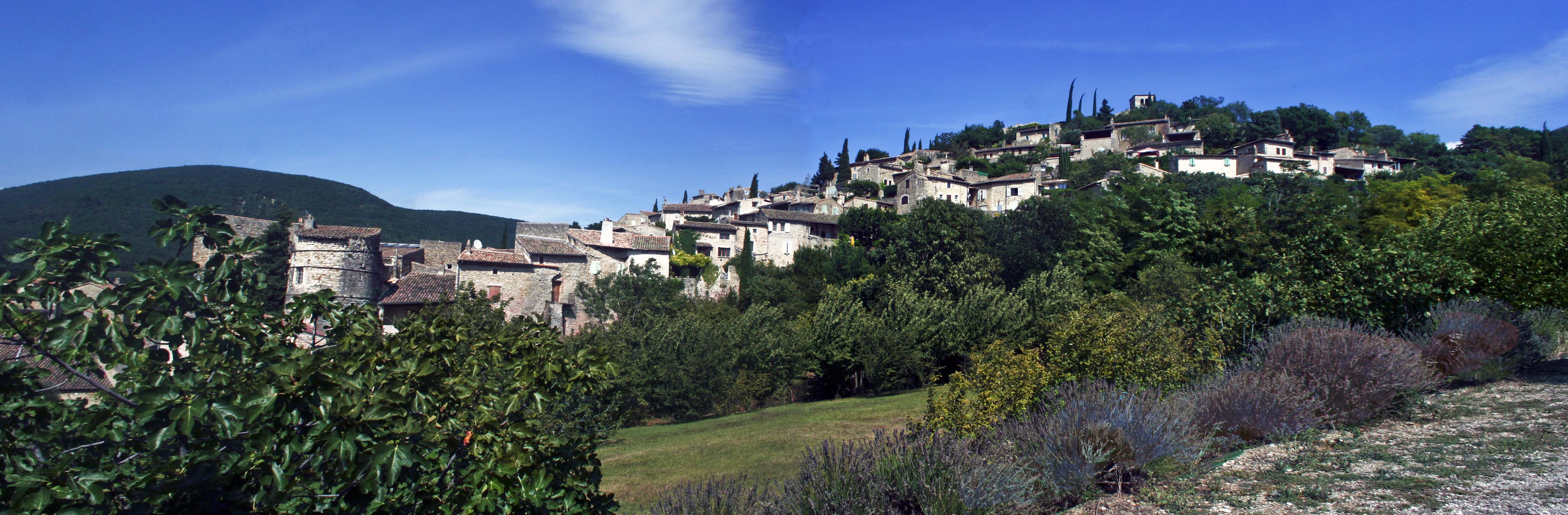 Mirmande (Drôme), vue générale